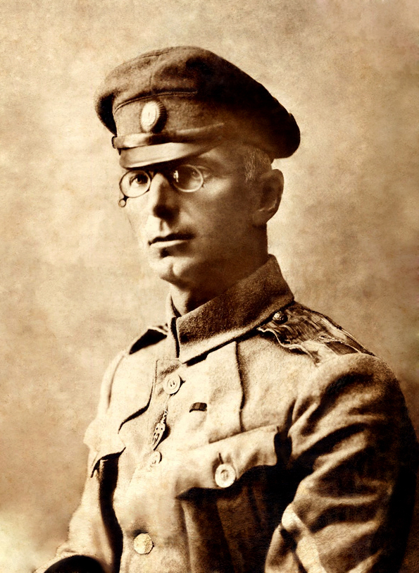 Генерал Михаил Дроздовский Портрет деятеля Белого движения М. Г. Дроздовского